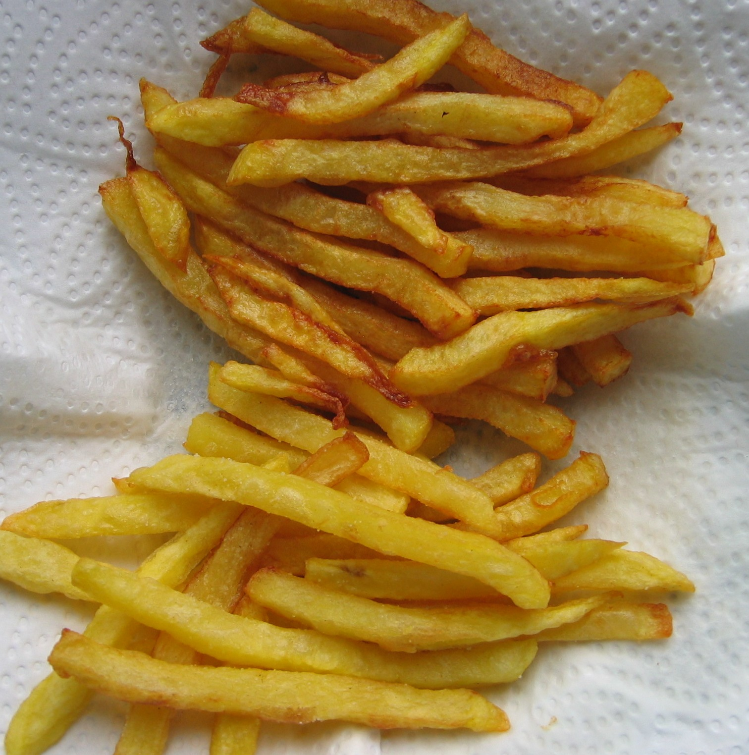 Zu heiß fritiert